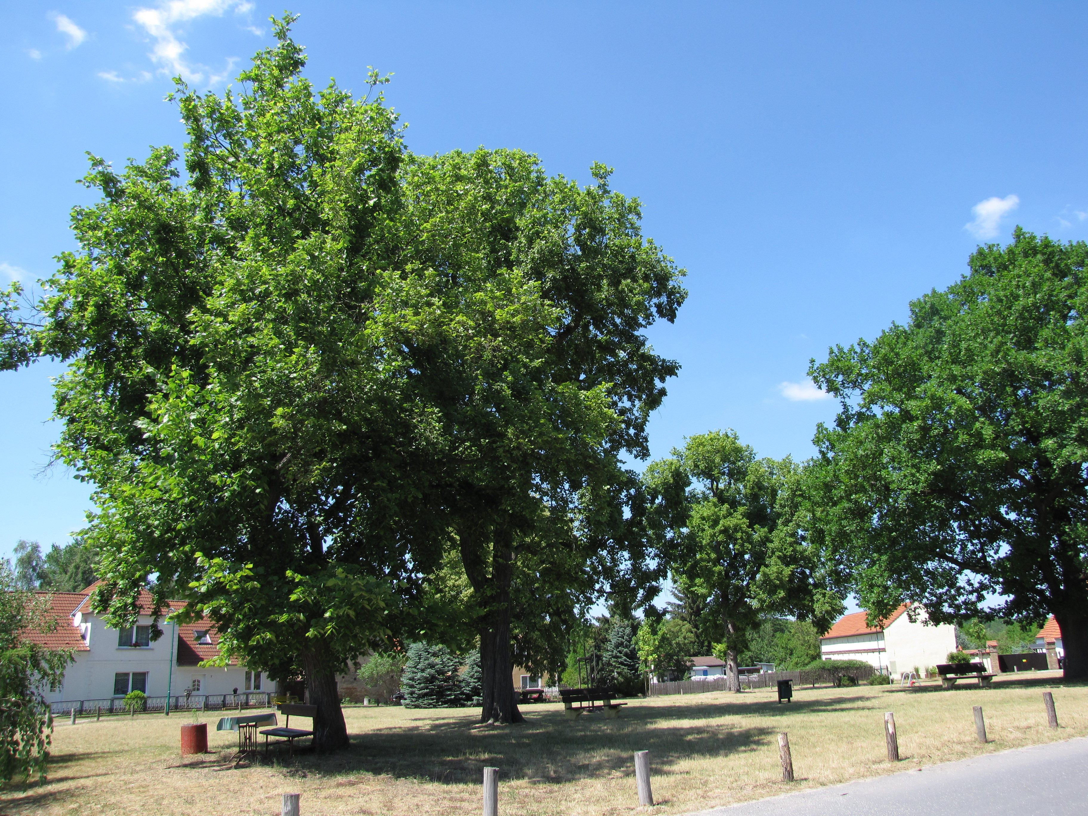 Dorfplatz in Zesch am See, Ortsteil Lindenbrück, Stadt Zossen, Brandenburg, Deutschland